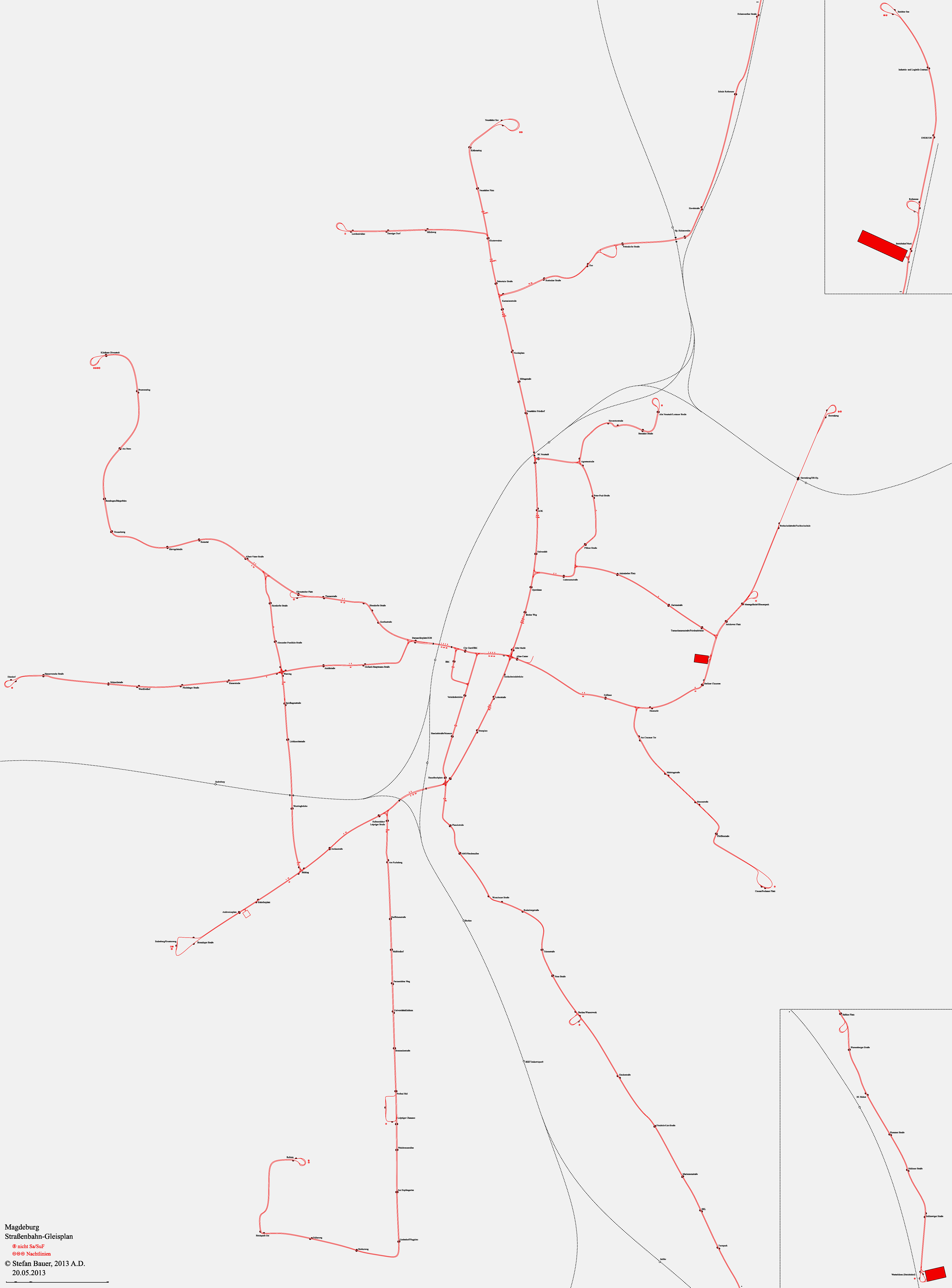 Straßenbahn-Gleisplan Magdeburg 2013